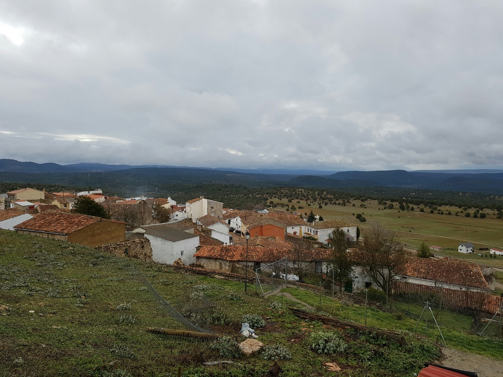 La Cierva, pueblo de Cuenca